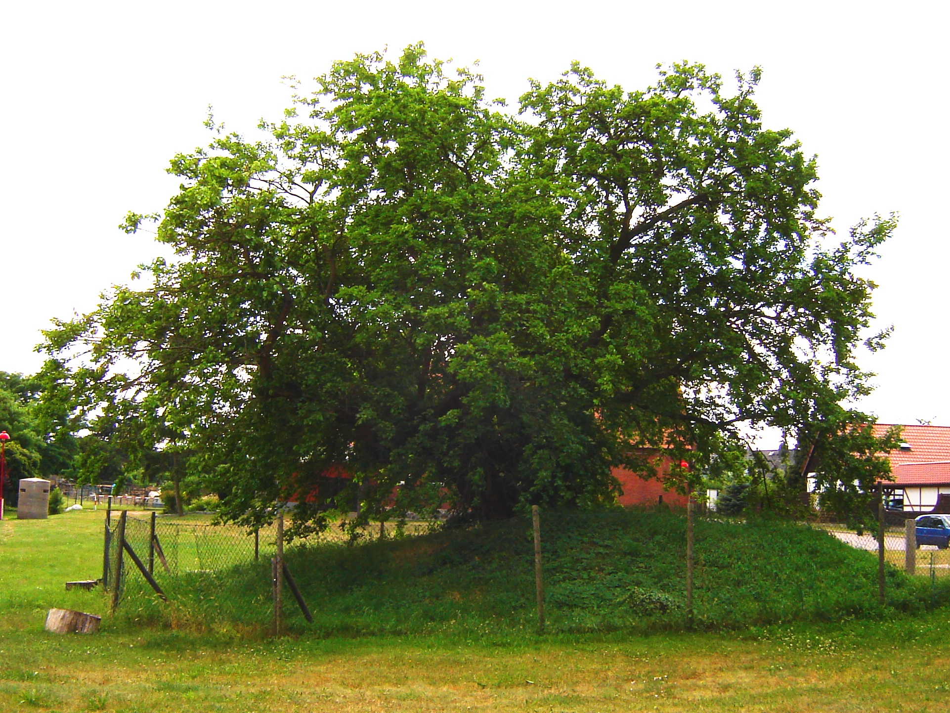 Schermen in Deutschland, alter Maulbeerbaum (Morus alba), Wahrzeichen des Ortes